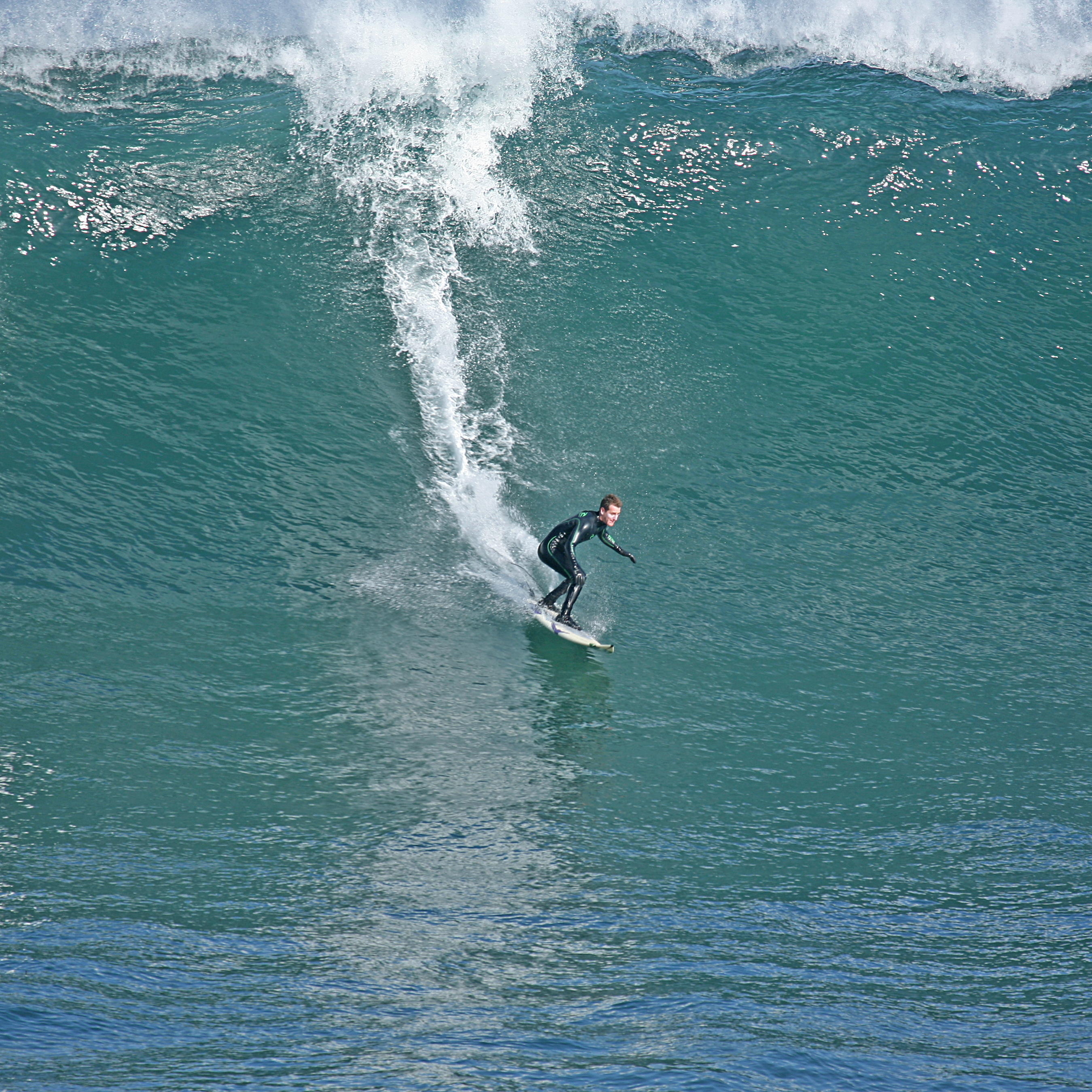 IMG_0364-1